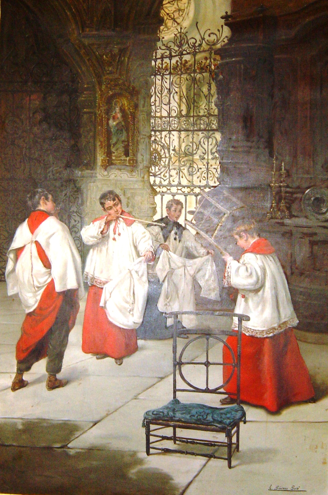 Cuadro Corto y Ceñido de Eduardo Sánchez solá